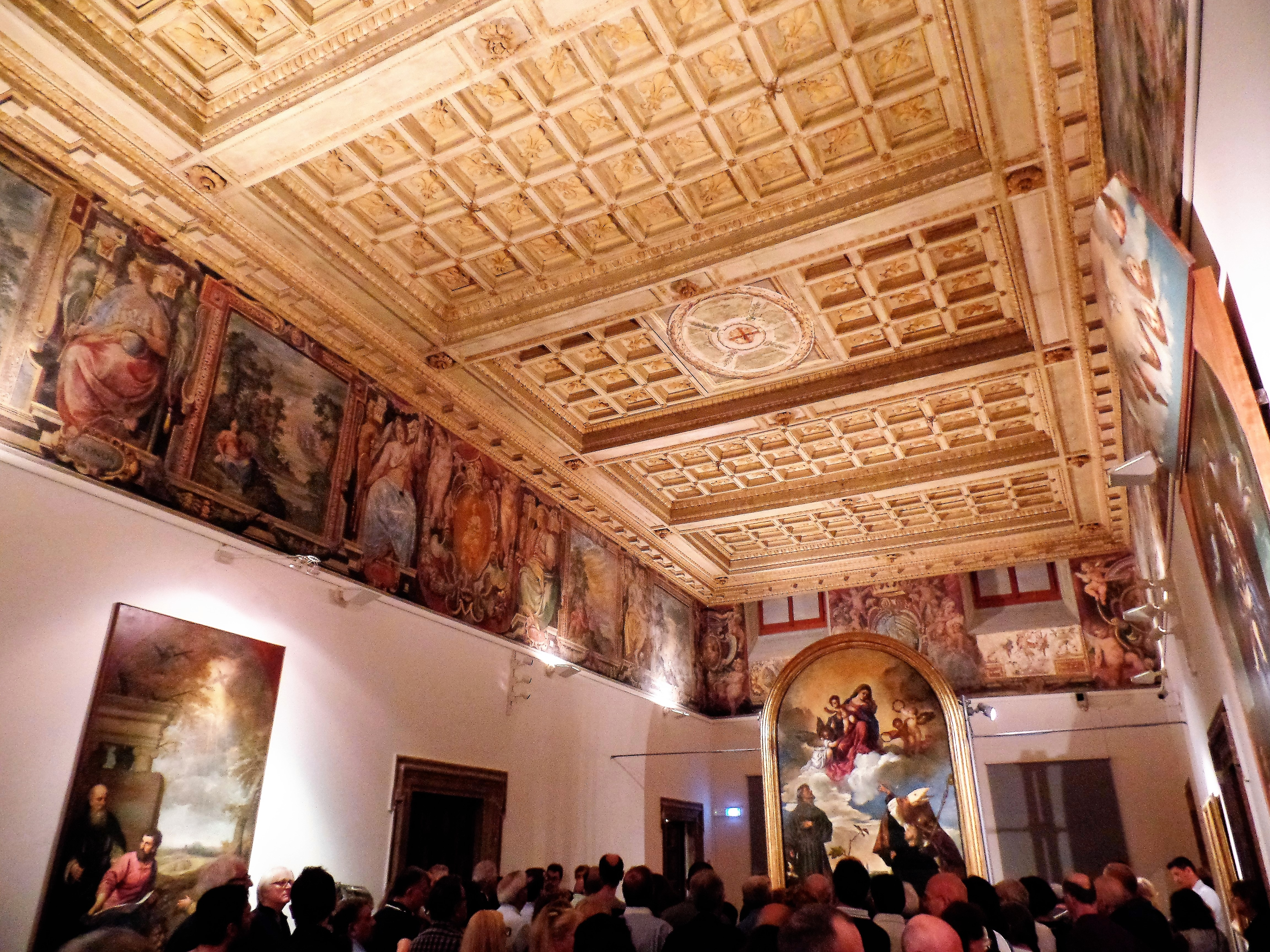 Pinacoteca Podesti AN interno classico